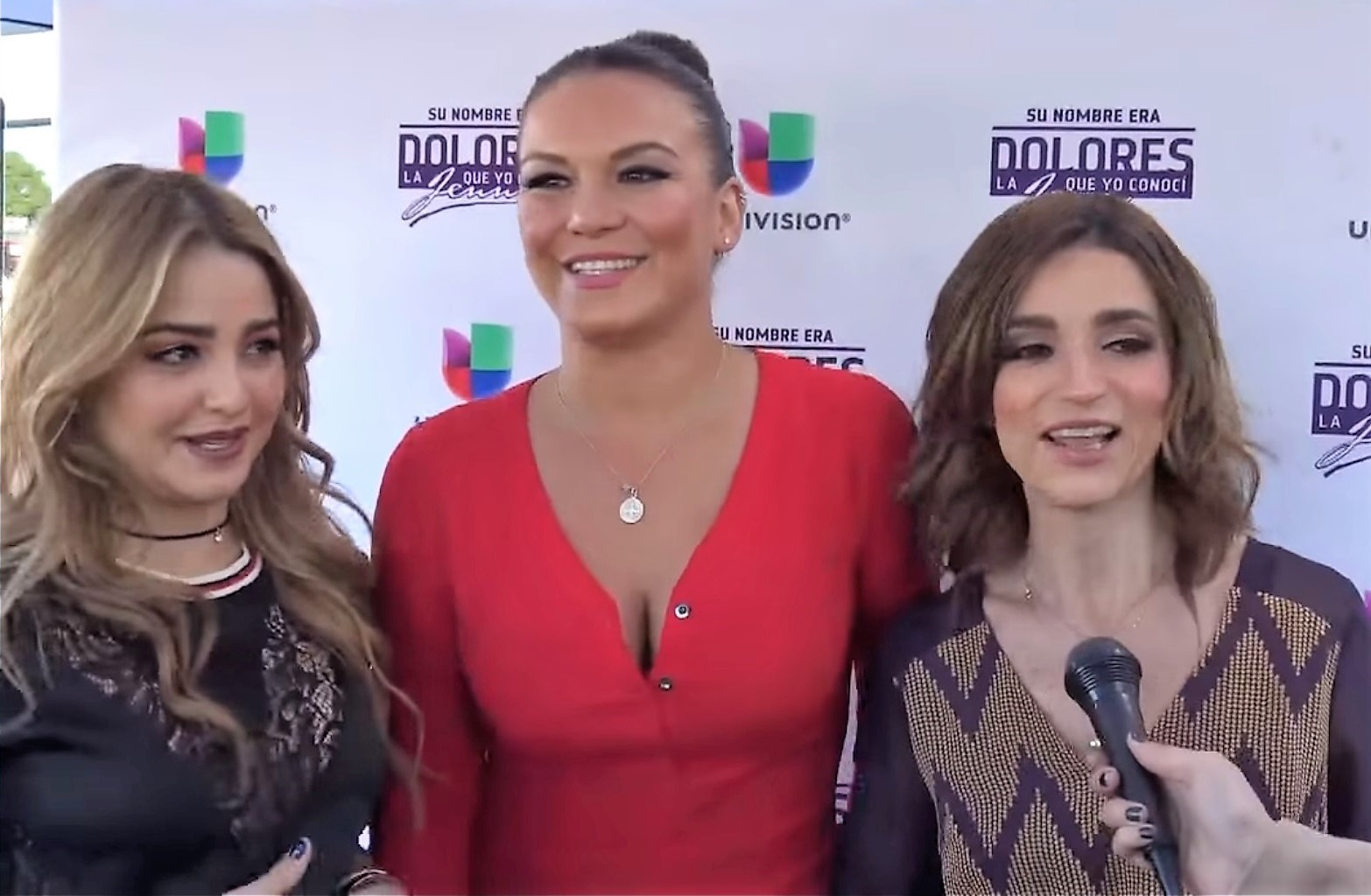 Ve como Luz Ramos y Geraldine Galván interpretan a Jenni Rivera y a Chiquis Copyright HolaHollywood y Dulce Osuna. Luz Ramos, Geraldine Galván, Marianna Burelli interpretan a Jenni Rivera, Chiquis y Rosie Rivera, esto es solo un avance de lo que podrás ver en "Su Nombre era Dolores" su gran estreno hoy por Univision a las 8pm.